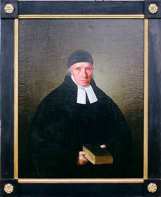 Ölgemälde, dargestellt ist Carl Jacob Wegener (* 6. März 1758; † 6. Juli 1845)